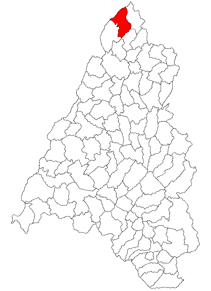 Categorie:Hărţi ale judeţului Bihor